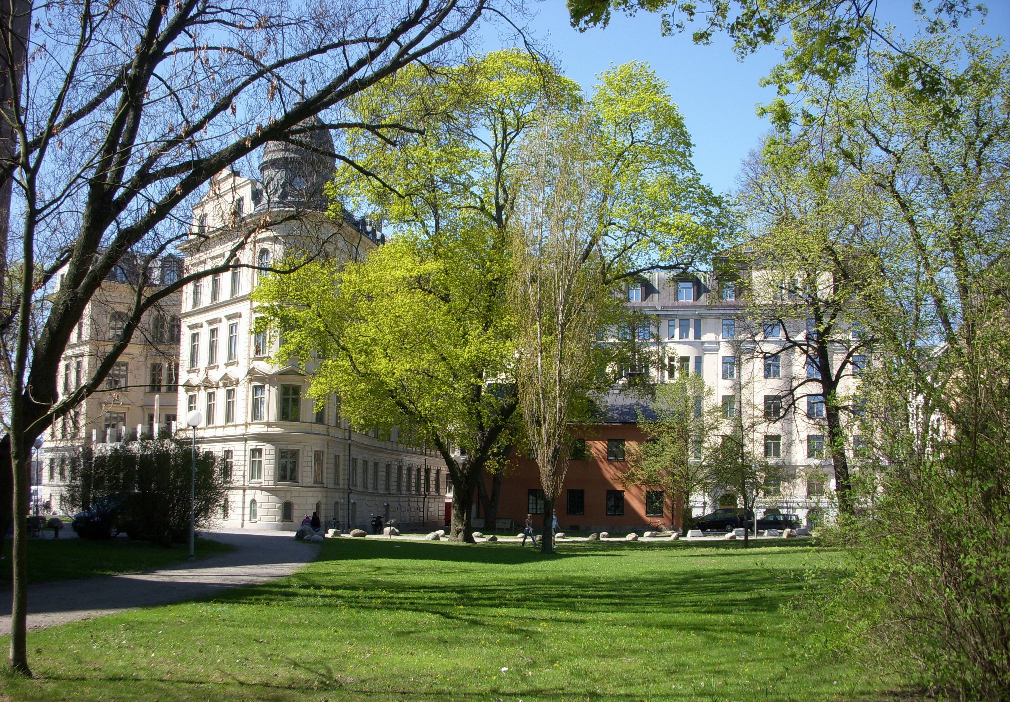 Museiparken på Blasieholmen i Stockholm